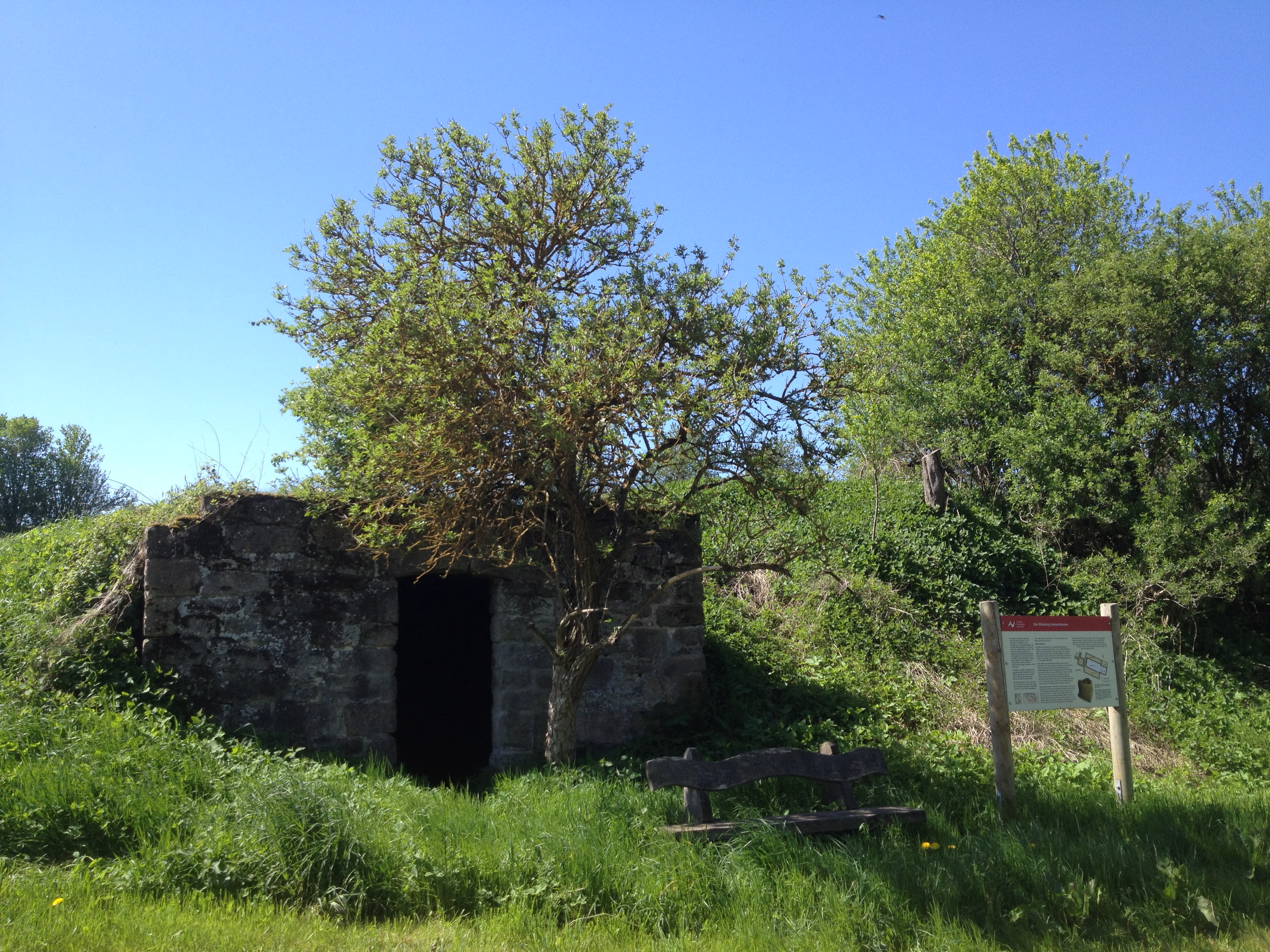 Station / Informationstafel "Wüstung Immenhausen" des Eco Pfades Archäologie Naumburg